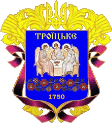 герб смт Троїцьке Луганської області